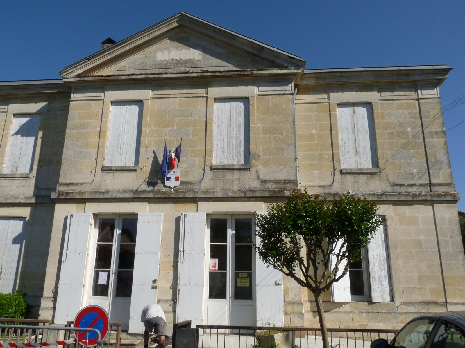 Ecole, Sablons, Gironde, France